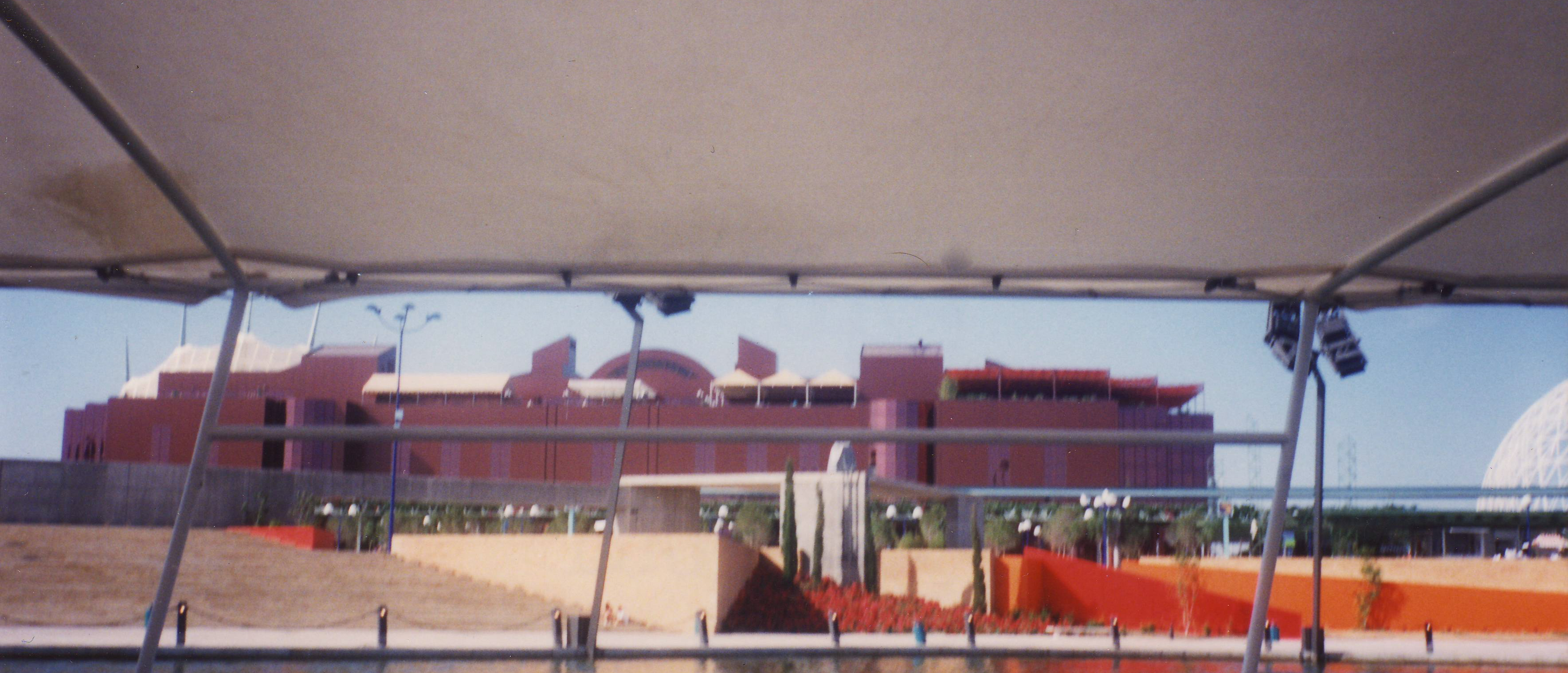 Exposición Universal Sevilla 92. Viaje en Abrilexpo 92 Exterior Am. Latina